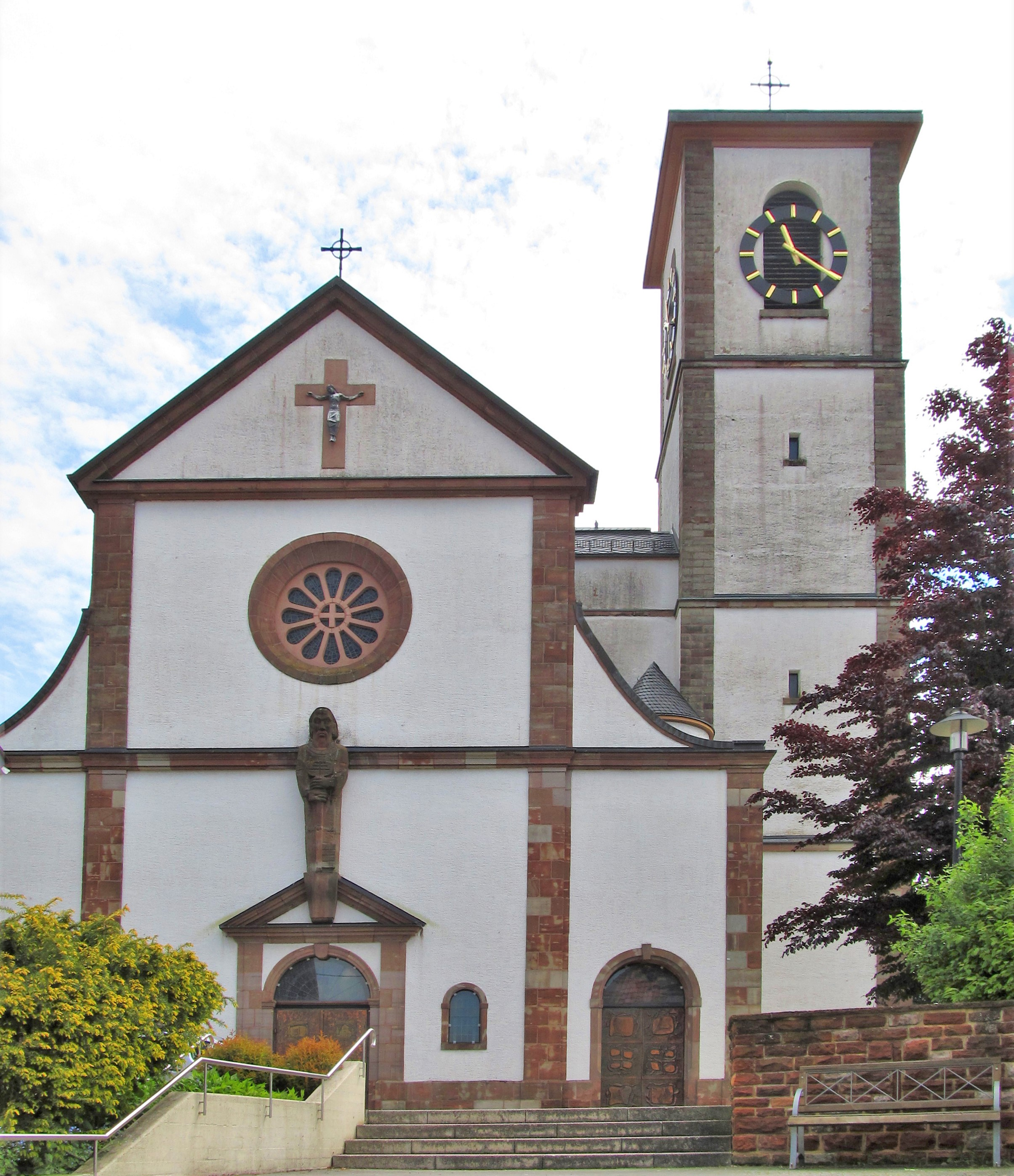 Die katholische Pfarrkirche St. Peter und Paul in Losheim, Gemeinde Losheim am See, Landkreis Merzig-Wadern, Saarland